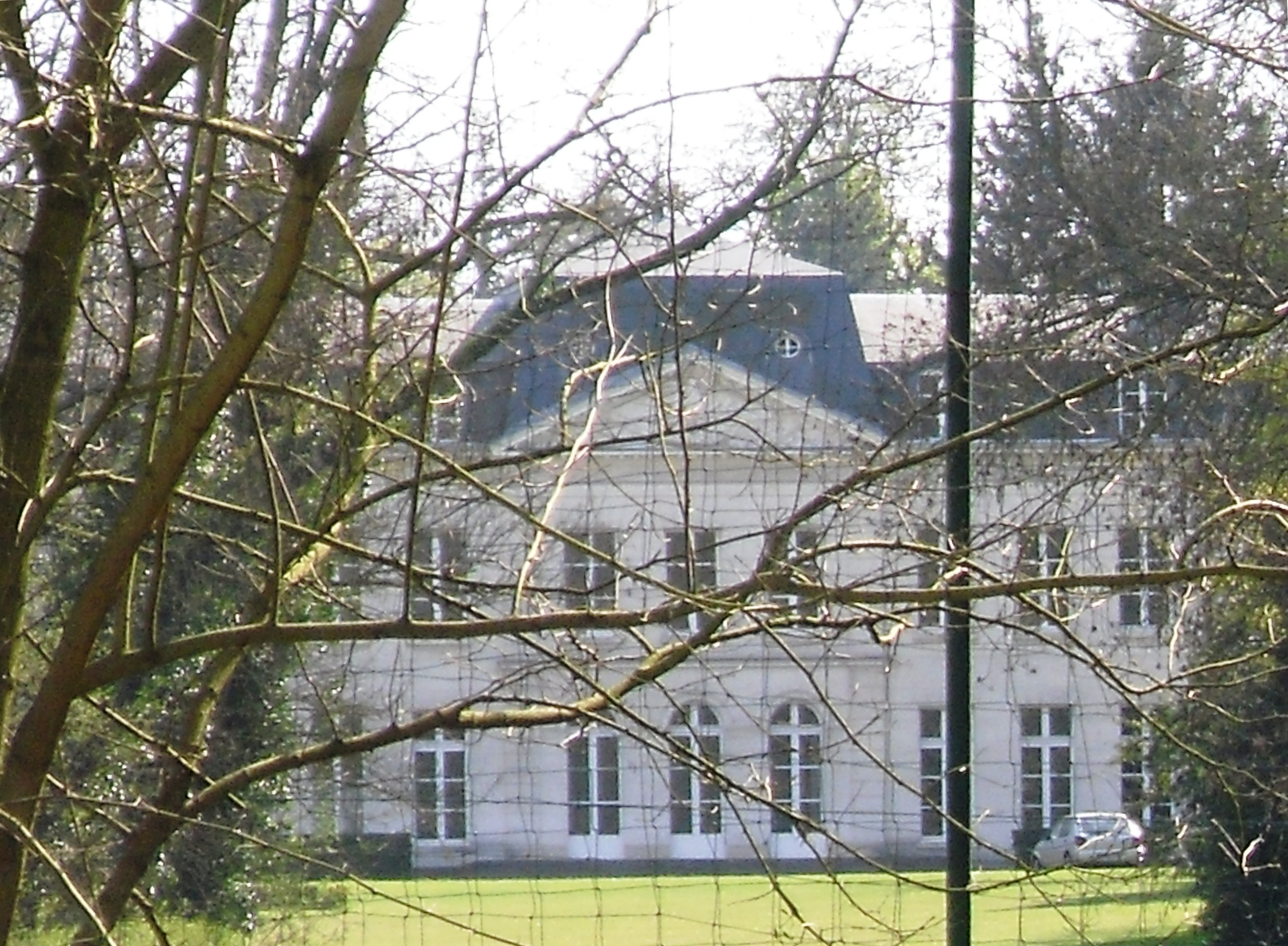 Détail de la façade nord du château de Vilgénis à Massy (91)